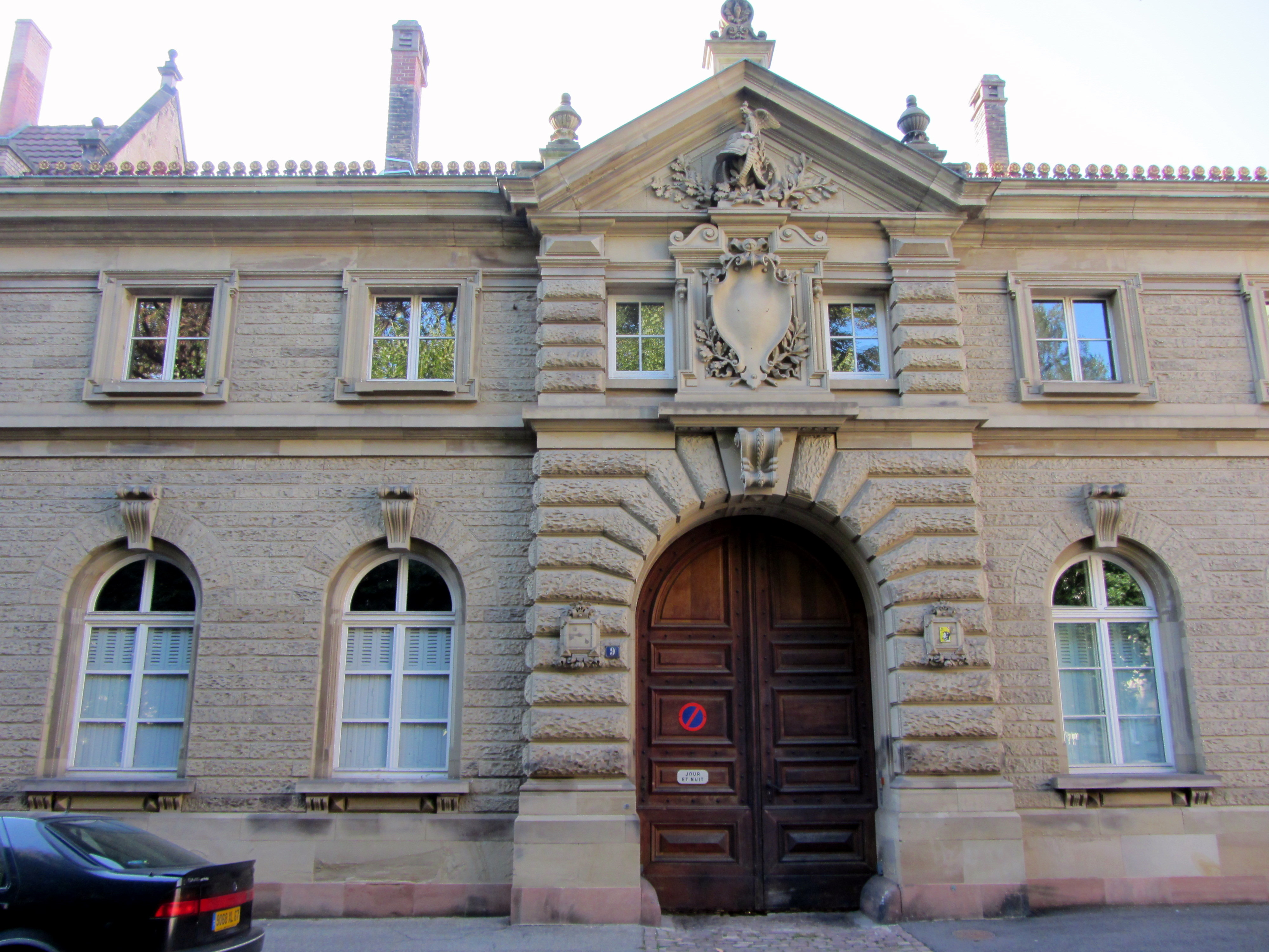 Pour ne pas surcharger l'environnement du palais impérial, les écuries ont été implantées à l'angle d'un îlot postérieur, rue du Général Frère, dans un style et un matériau apparentés à ceux du palais. Source : dictionnaire des monuments historiques (La Nuée Bleue) .